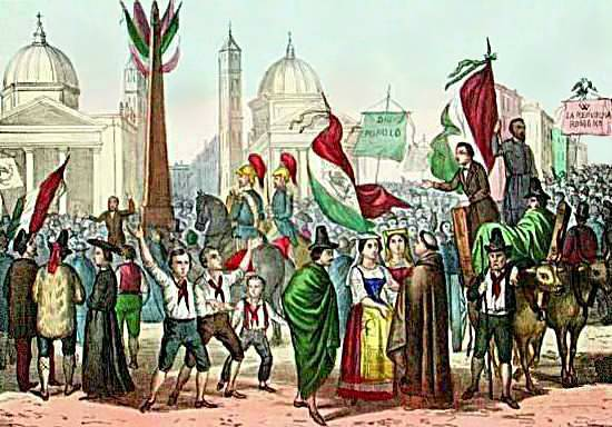 Proclamazione delle Repubblica Romana, 1849, litografia, ridotto